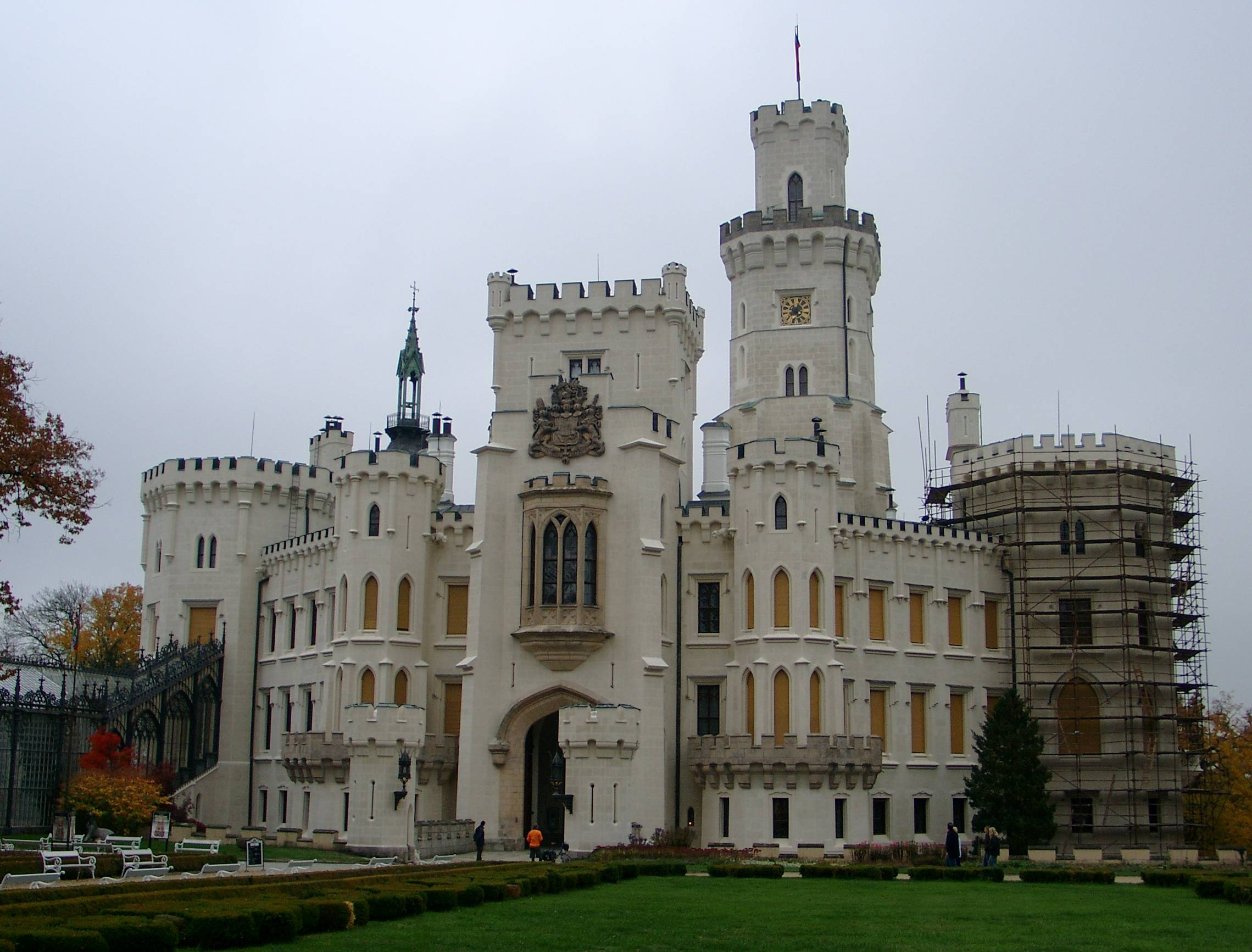 Schloss Hluboká